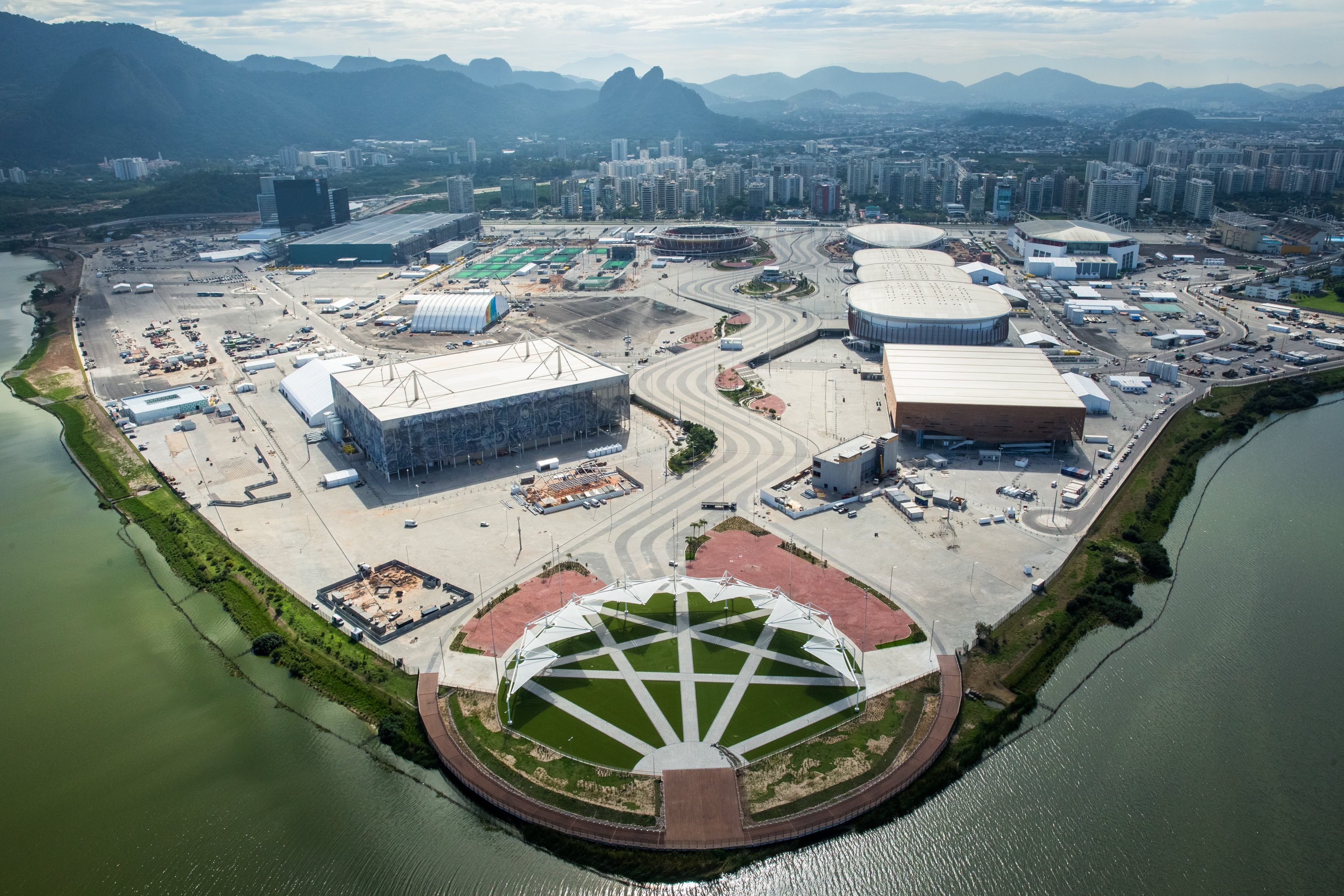 Parque Olímpico dos Jogos Olímpicos de 2016